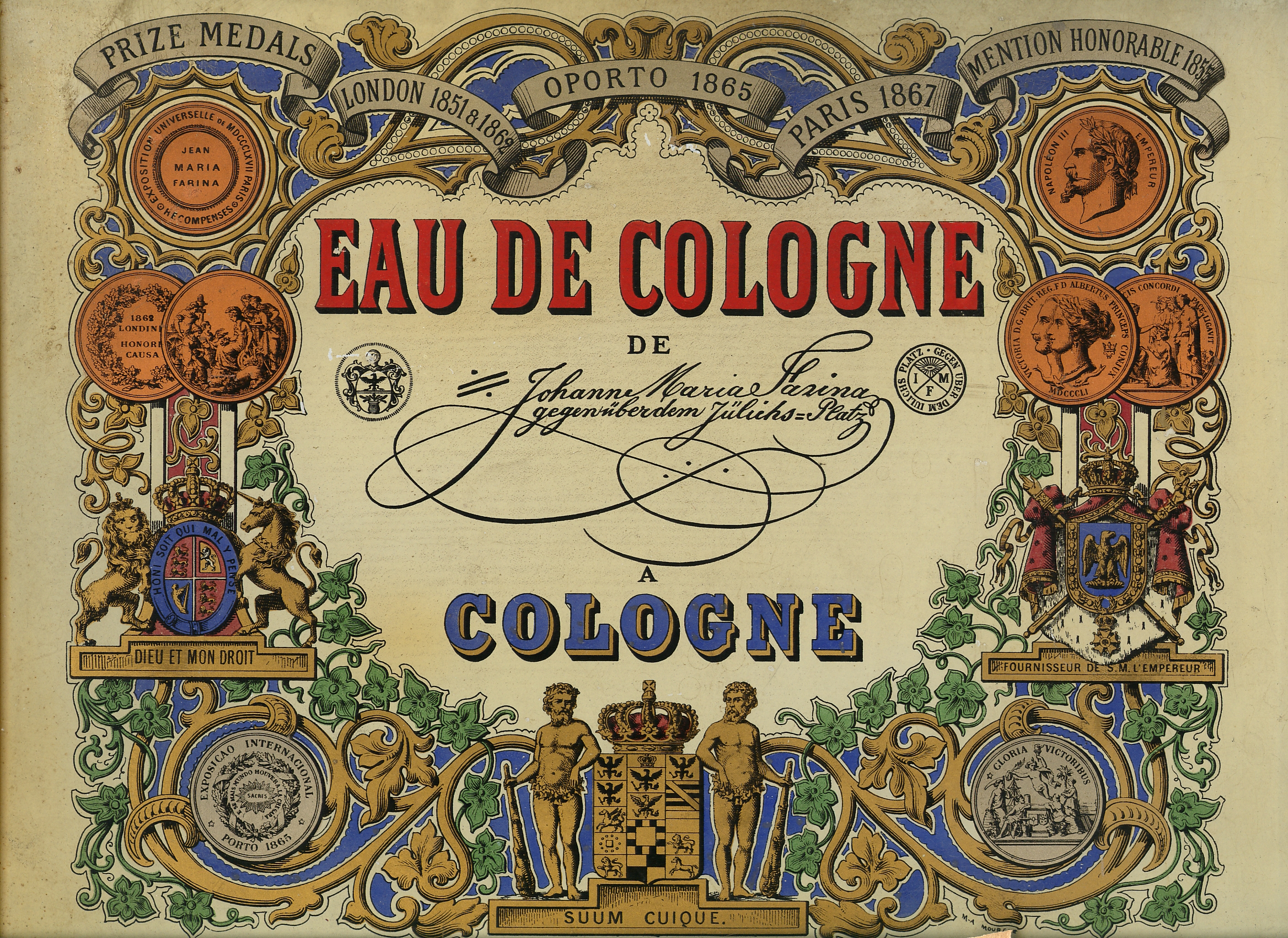 Firmenschild von Johann Maria Farina gegenüber dem Jülichs-Platz, Köln, aus dem Jahr 1868